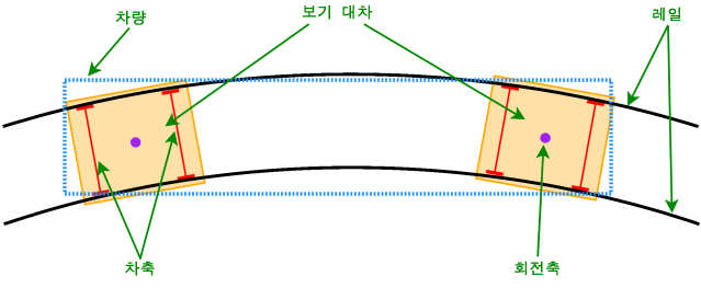 보기차의 곡선통과 메커니즘